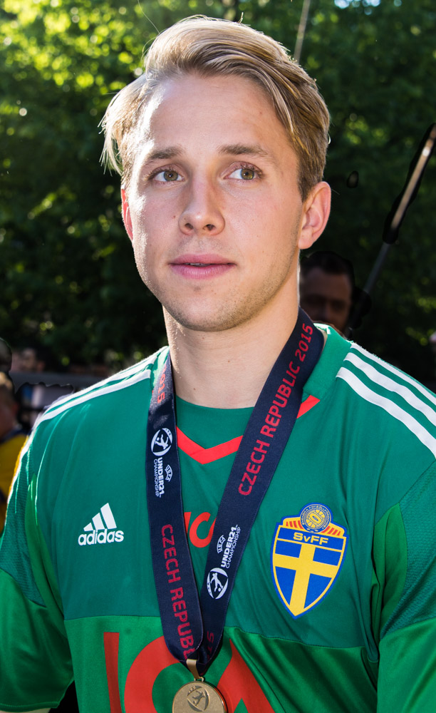 Patrik Carlgren och U21-mästarna firas i Kungsträdgården i Stockholm den 1 juli 2015.